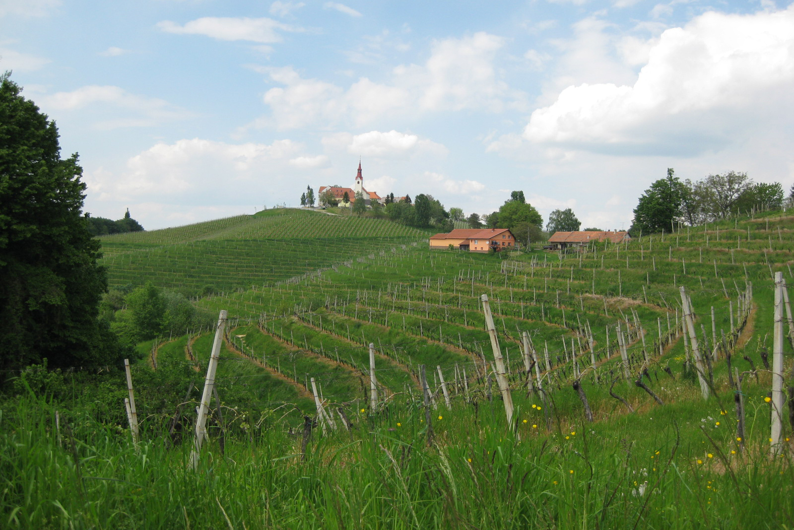 Svetinje, village in Slovenia